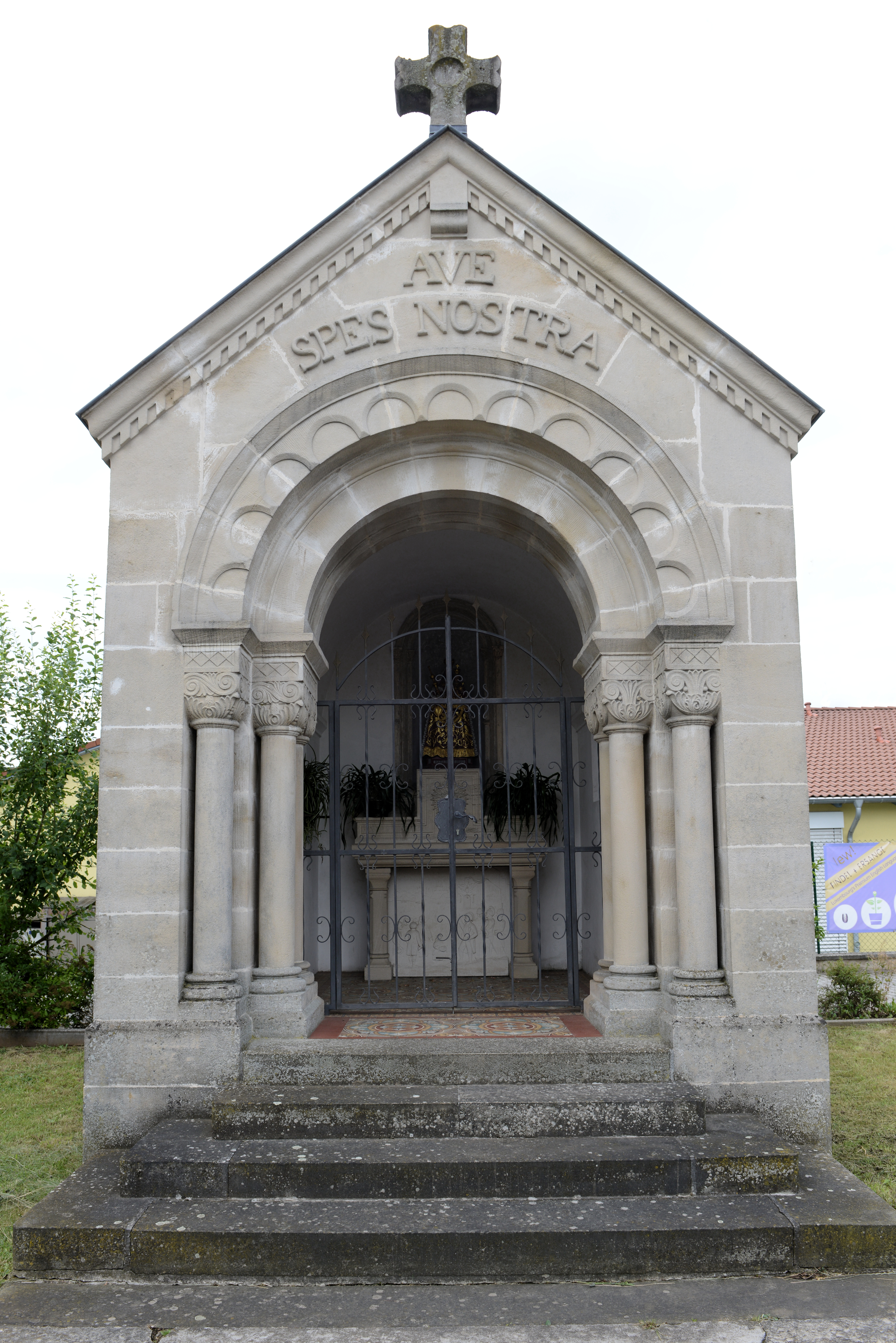 D'Weekapell «Ave Spes Nostra» op der Réimecherstrooss zu Mutfert.